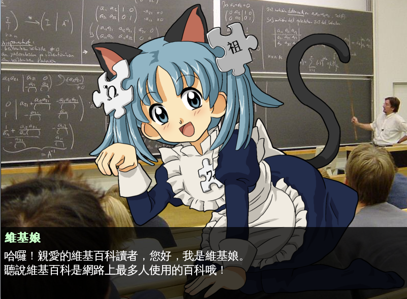 中文（台灣）: 用於Ren'Py的中文維基簡介